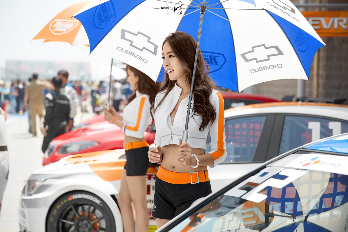 2013 CJ 슈퍼레이스 개막전 쉐보레 레이싱팀 레이싱모델 은빈